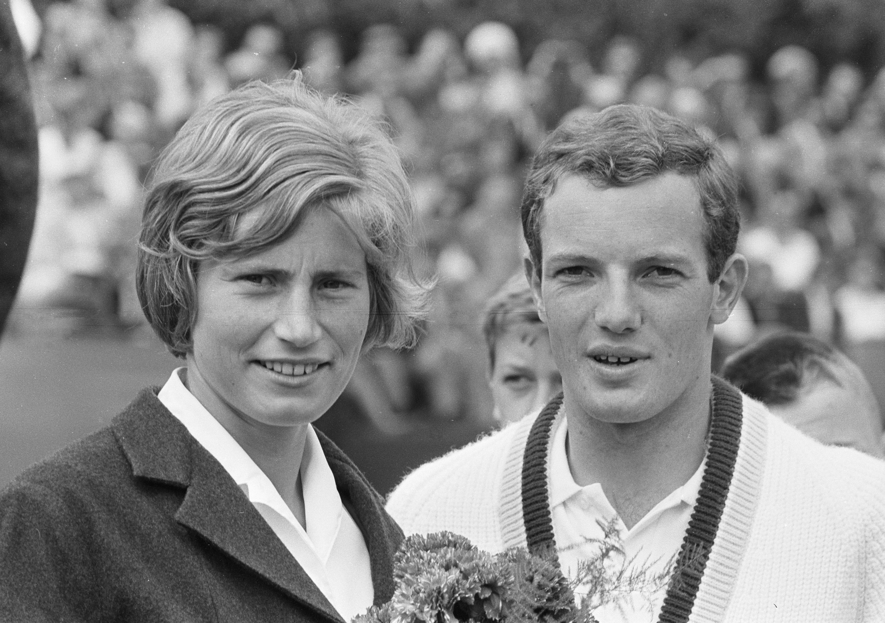 Tennis op METS-banen in Den Haag, Trudy Groenman en Tom Okker